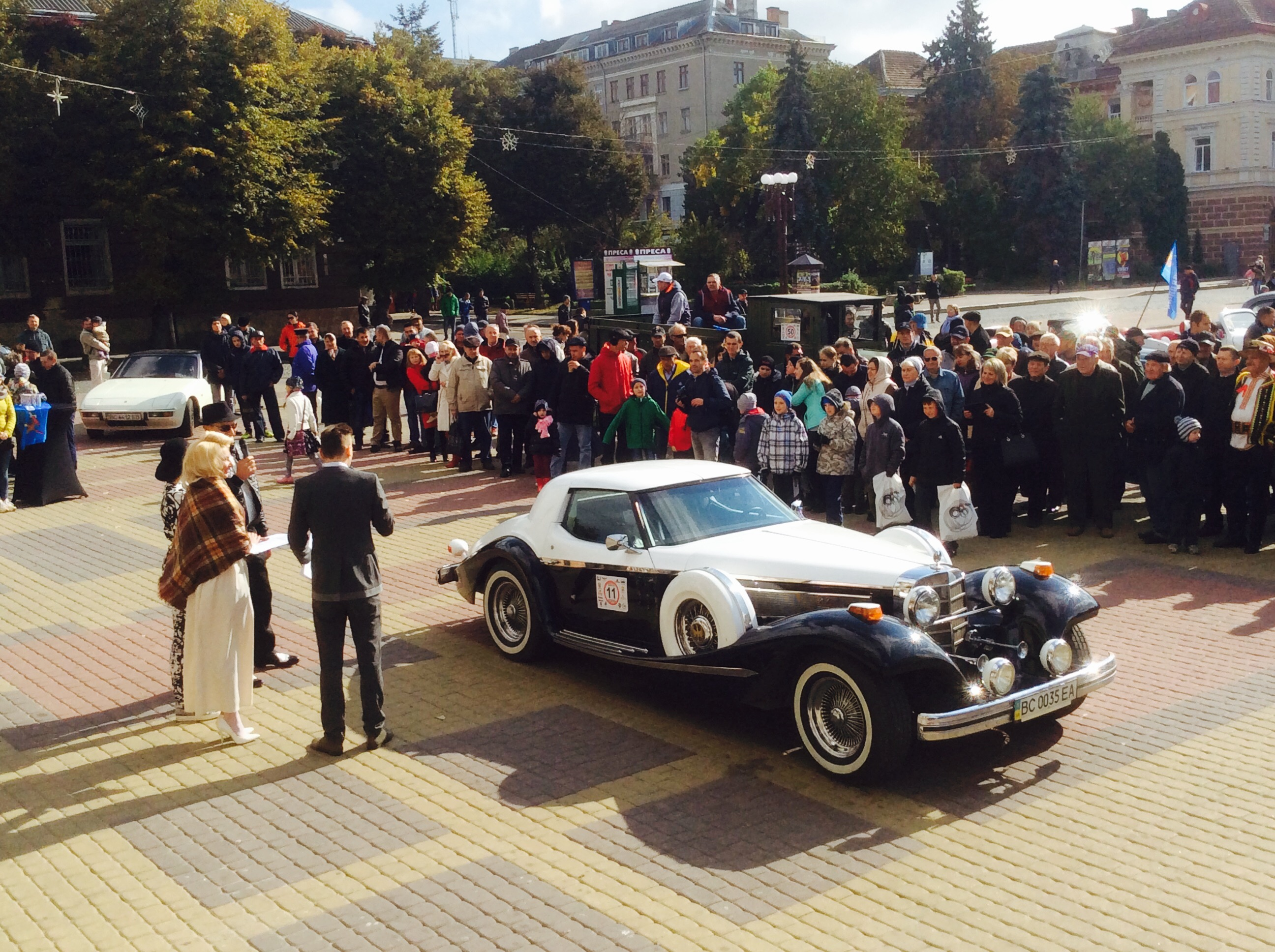 Тернопіль 2016